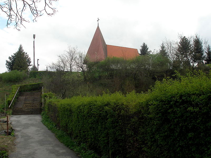 Obec Drienovská Nová Ves v okrese Prešov, región Šariš